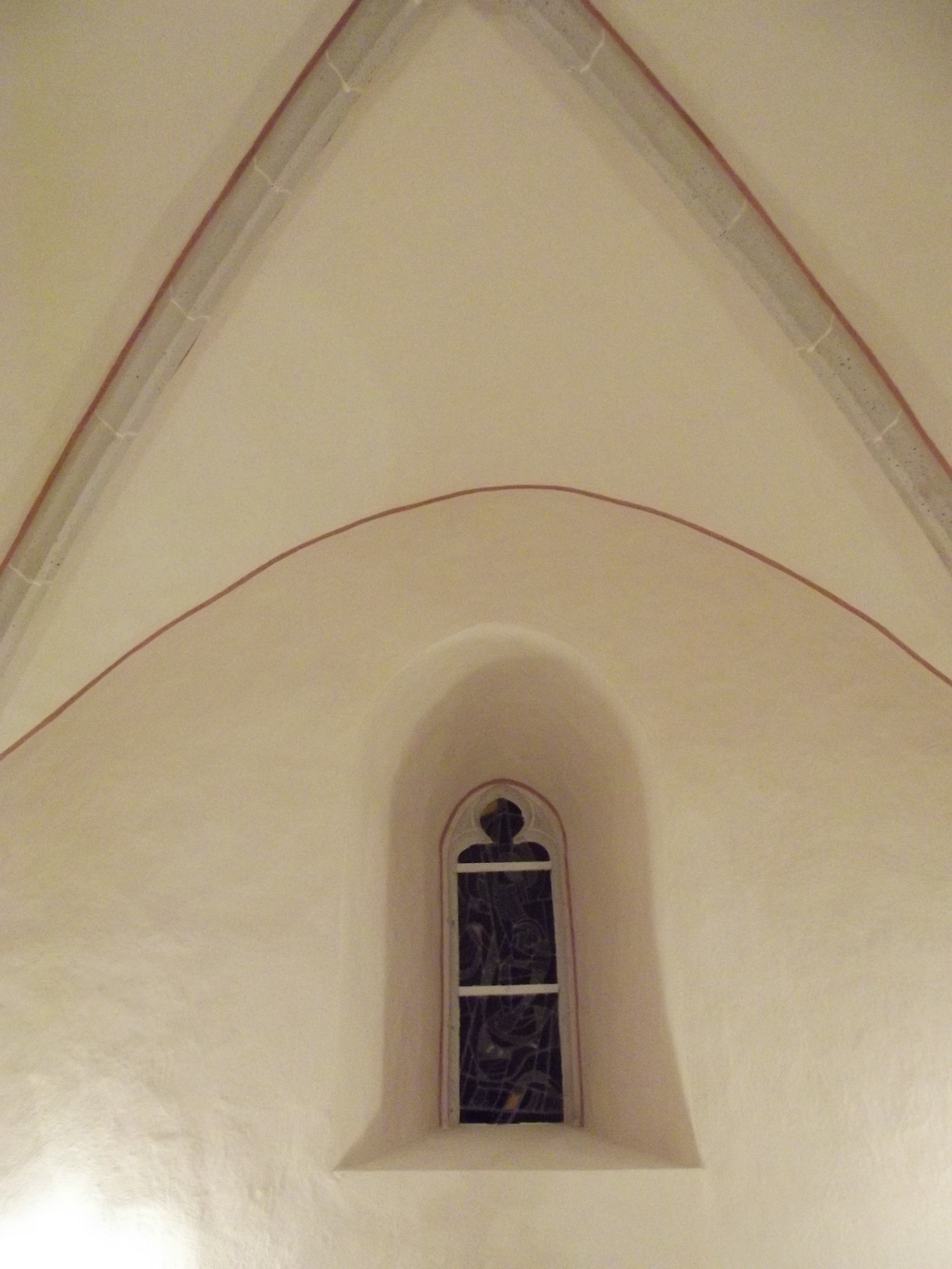 Katharinen-Kapelle in Steinheim (Hungen), Landkreis Gießen, Hessen